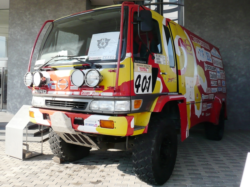 Hino Ranger Dakar Rally model.